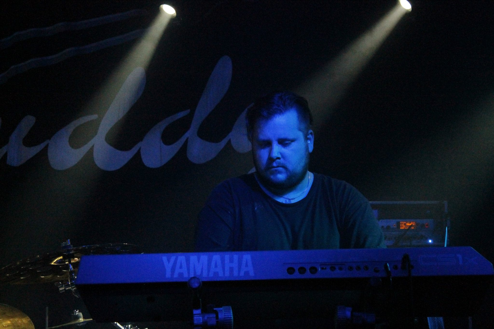 Daniel Stensson-Oreviken med Yamaha CS1X